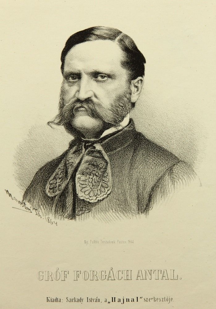 Ghymesi és gácsi gróf Forgách Antal (Gács, 1819. április 16. – Gács, 1885. április 2.) királyi biztos, császári biztos, főispán, valóságos belső titkos tanácsos, helytartó, főkancellár, országgyűlési képviselő.